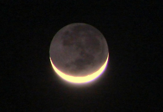 Falce di Luna nel cielo notturno